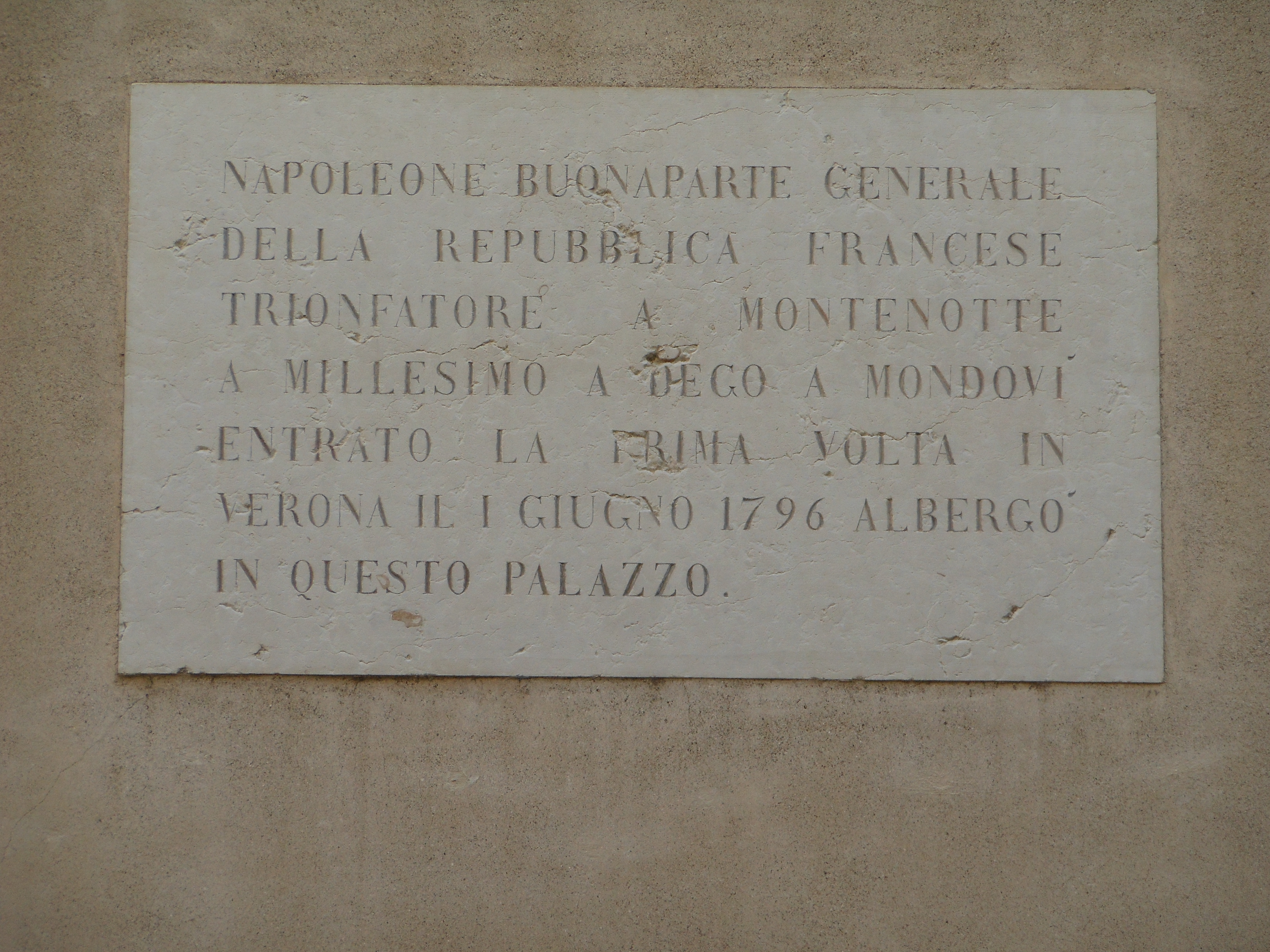 Lapide commemorativa della presenza di Napoleone Bonaparte a Palazzo Forti, in via Forti a Verona.